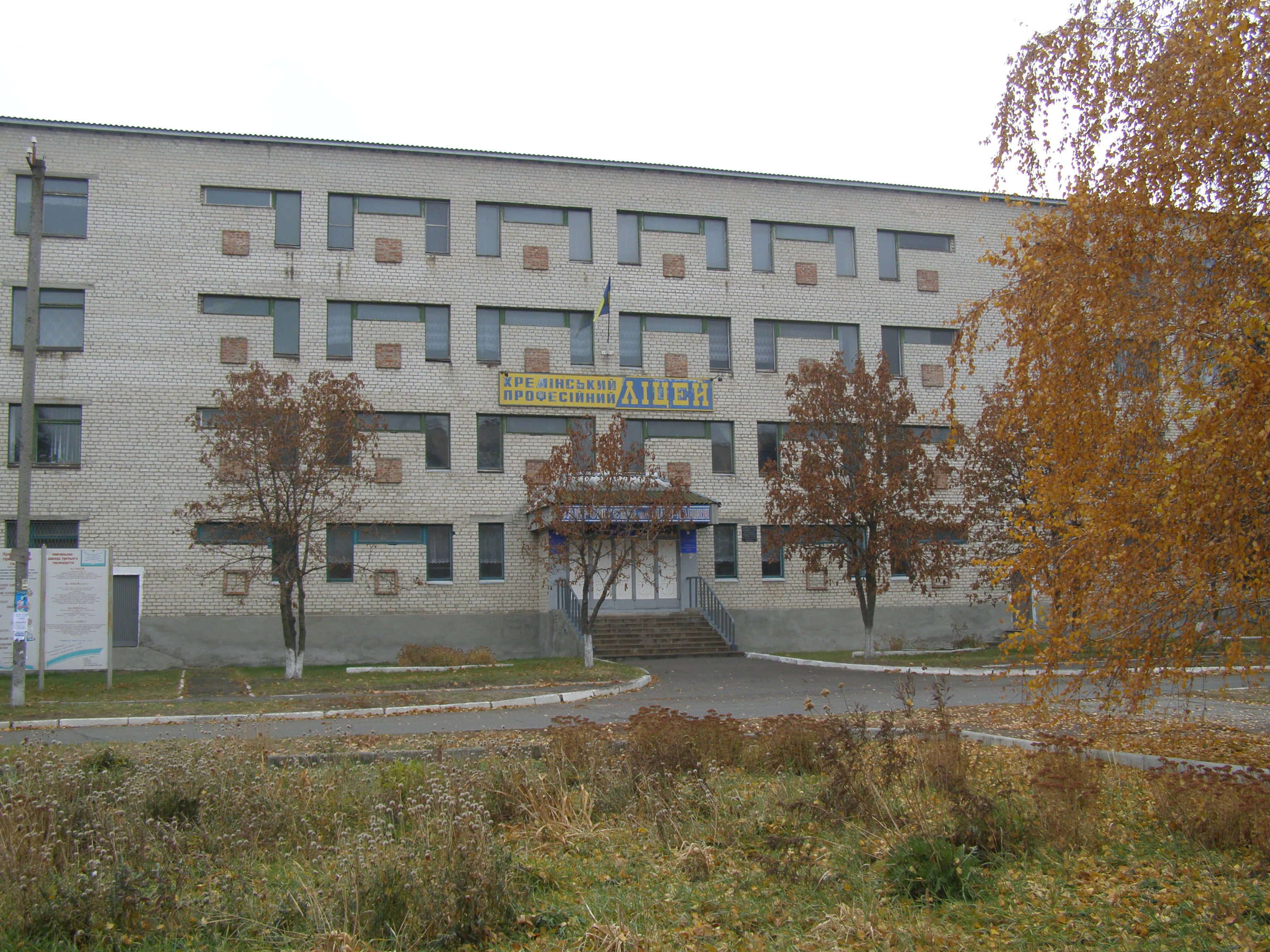 Будівля Кремінського професійного ліцею. Побудований у 1980 р.